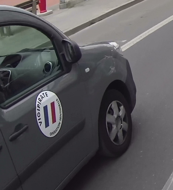 Marquage véhicule Mission Vigipirate (Opération Sentinelle)